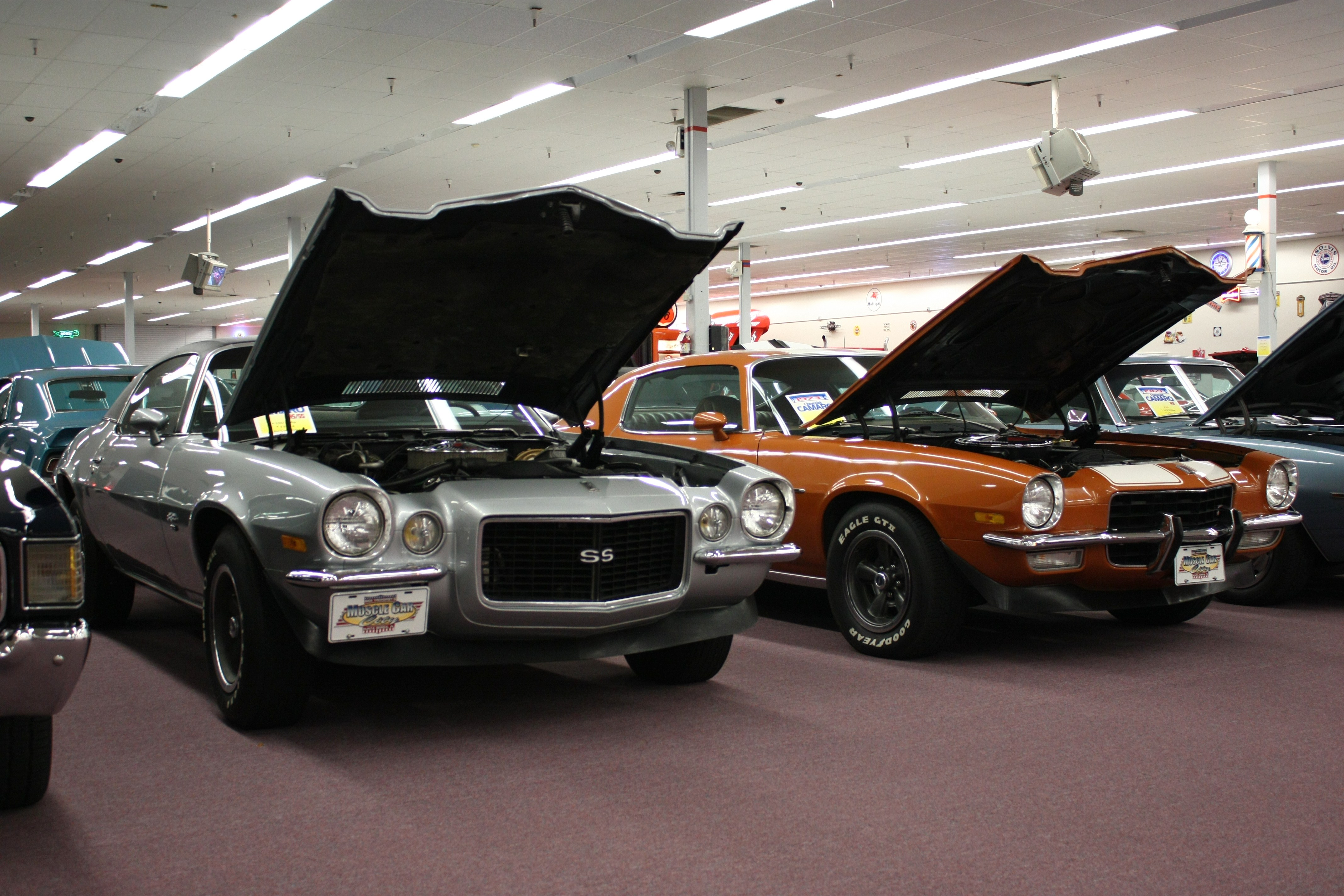 Camaros